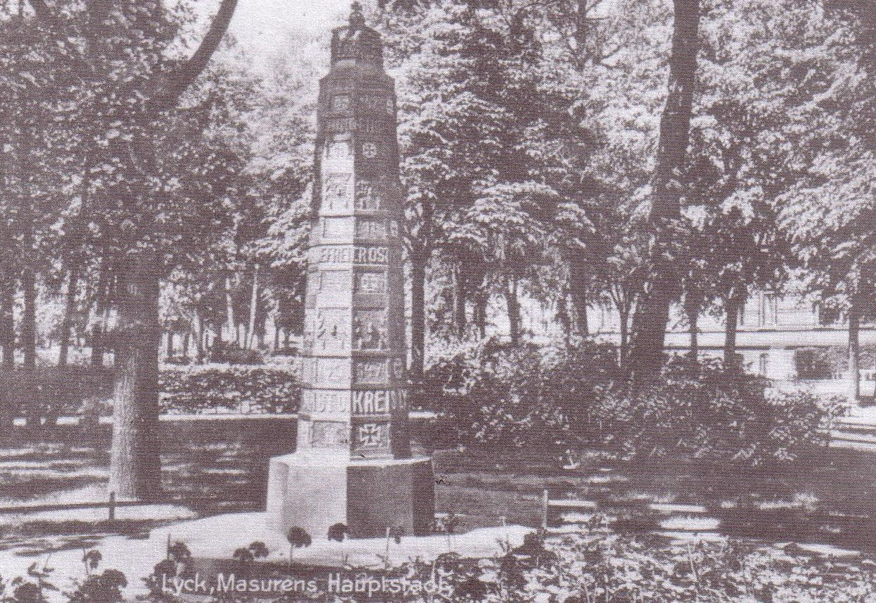 Ehrensäule für Generalfeldmarschall Paul von Hindenburg auf dem Königin-Luise-Platz in Lyck